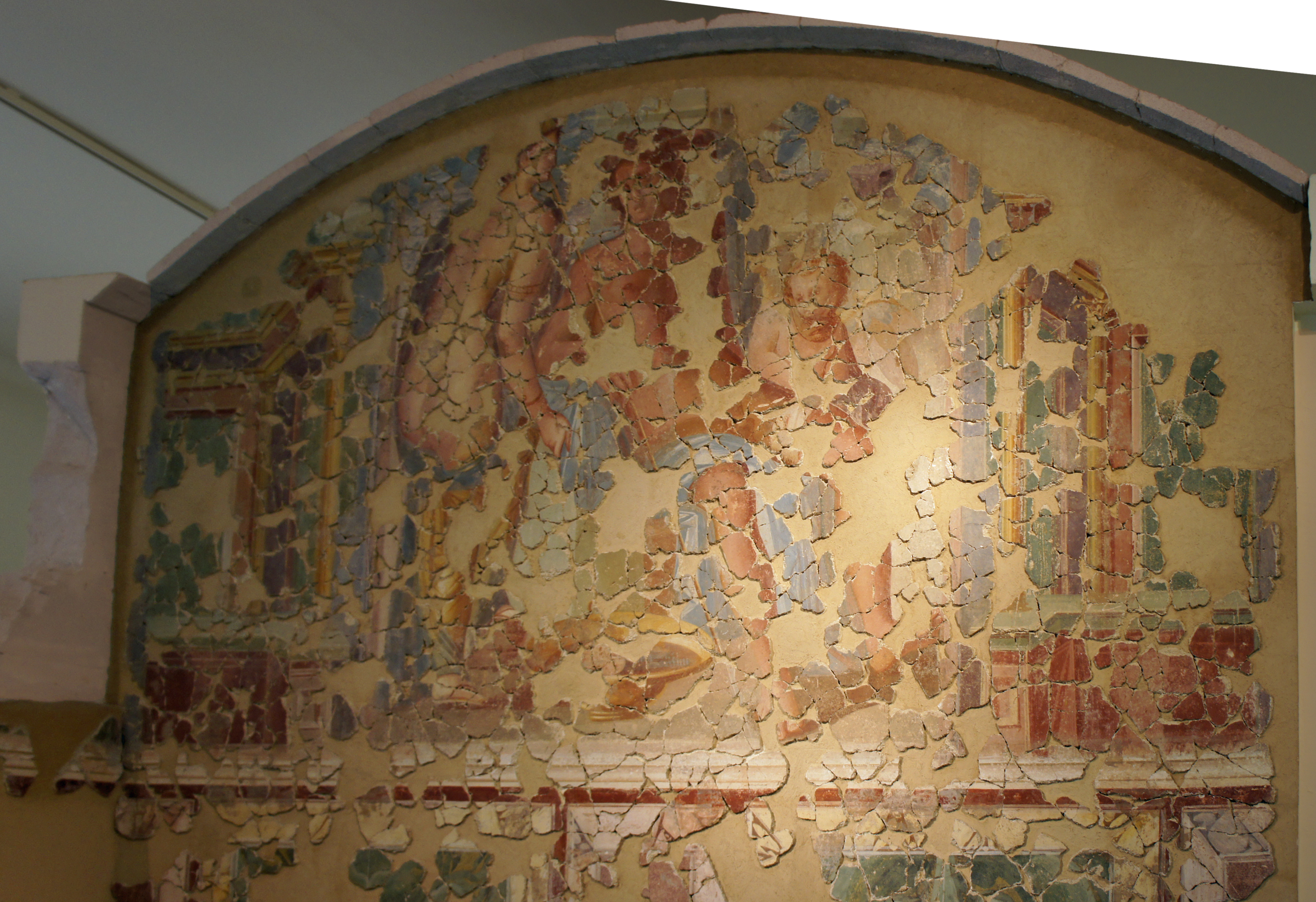 Une fresque retrouvée dans un mausolé de Boult_sur_Suippe : La_mort_d'Adonis_elle date du_IIe.